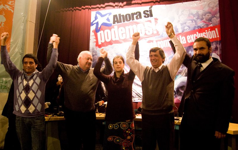 Candidatos del Partido Comunista de Chile para las elecciones parlamentarias del 2009. Cristián Cuevas (Presidente de la Confederación Nacional de Trabajadores del Cobre) Guillermo Teillier (Presidente del Partido Comunista de Chile), Claudia Pascual Grau, Lautaro Carmona (Secretario General del PC), Hugo Gutiérrez